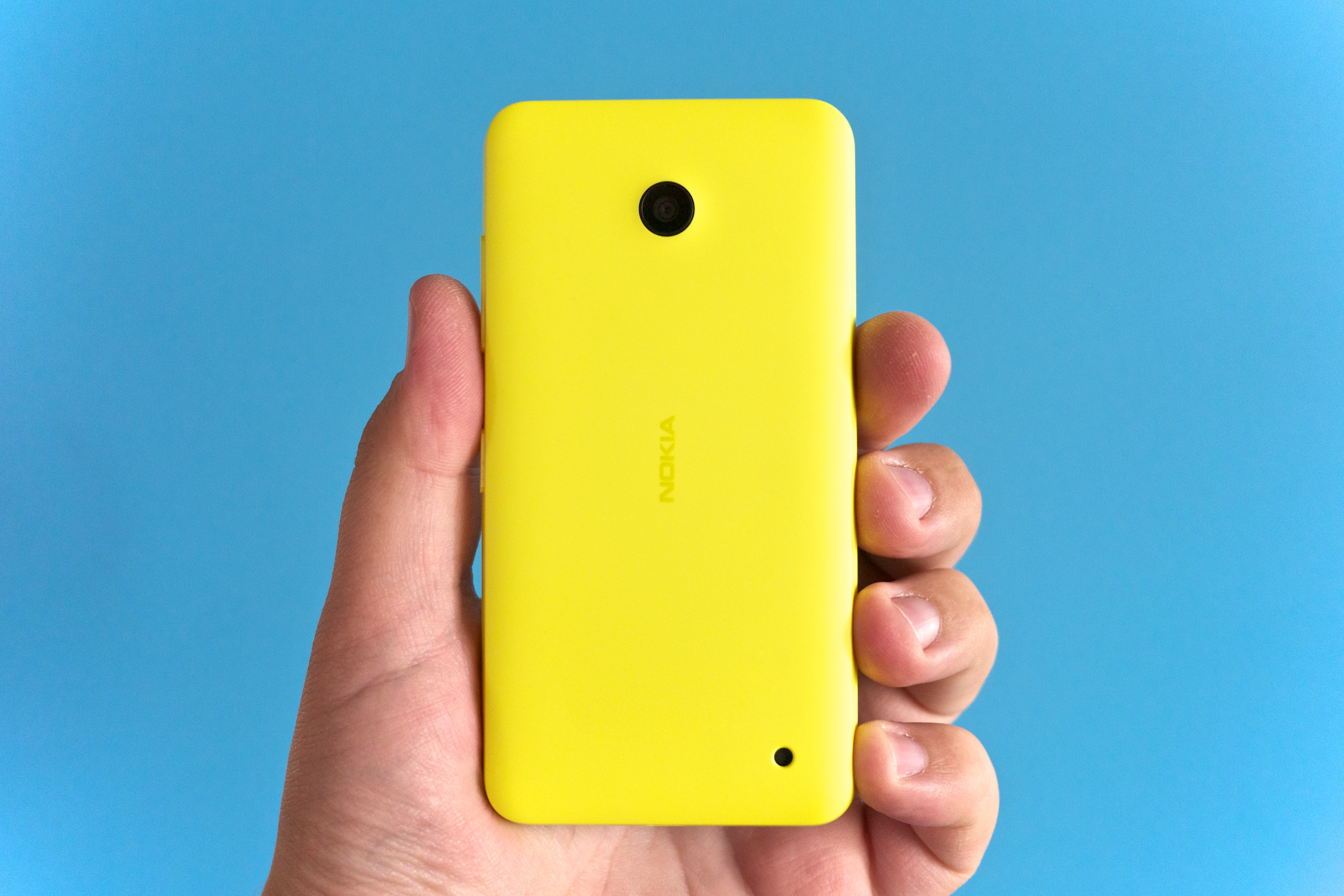 Nokia Lumia 630